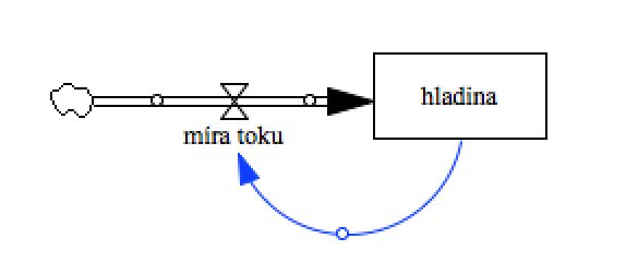 Hladina, tok, spoj SFD ve Vensim